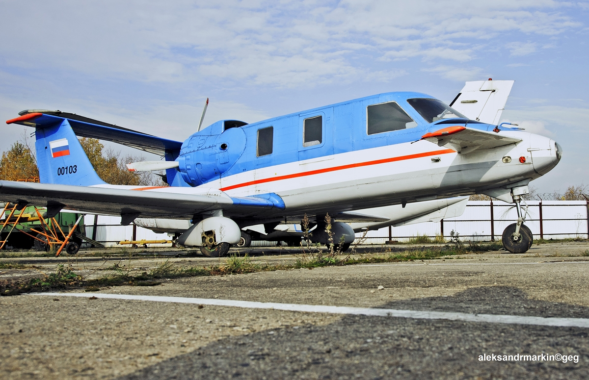 Triplane "Molniya". 00103